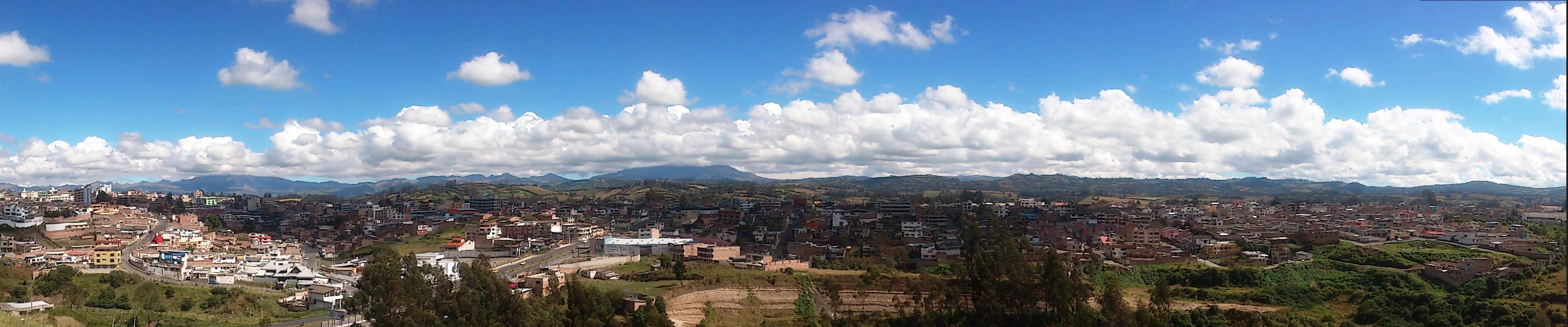 Parte nororiental de Tulcán, se aprecia la Av. Brasil